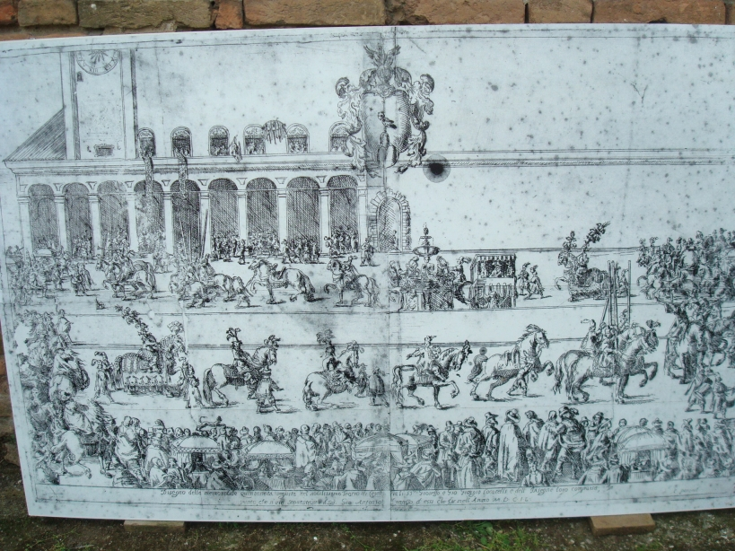 Cesena (Italie), fresque d'une joute antique au musée de la "Rocca Malatestiana"